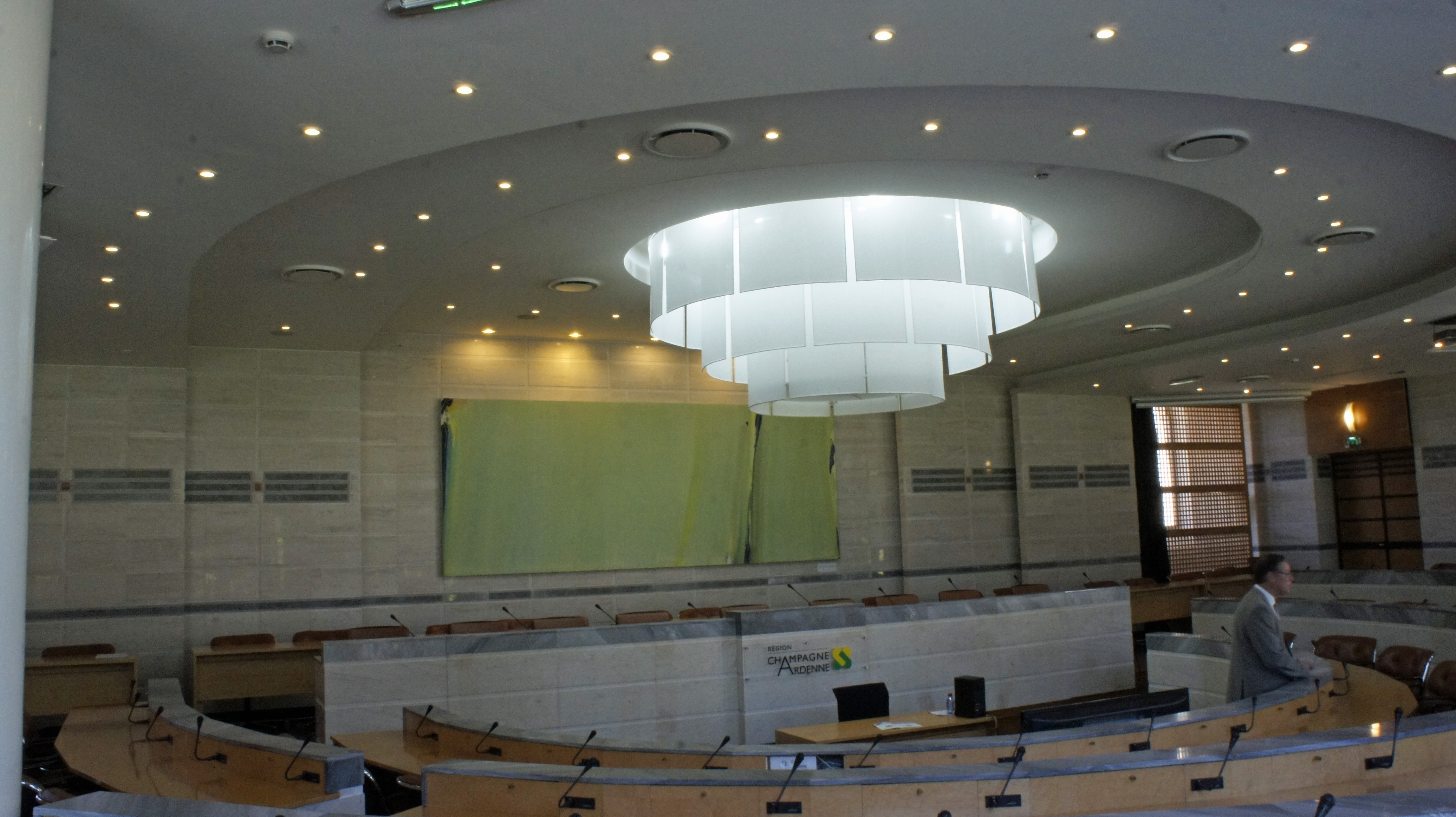 Salle du Conseil régional dans l'Hôtel de région de la Champange-Ardenne .